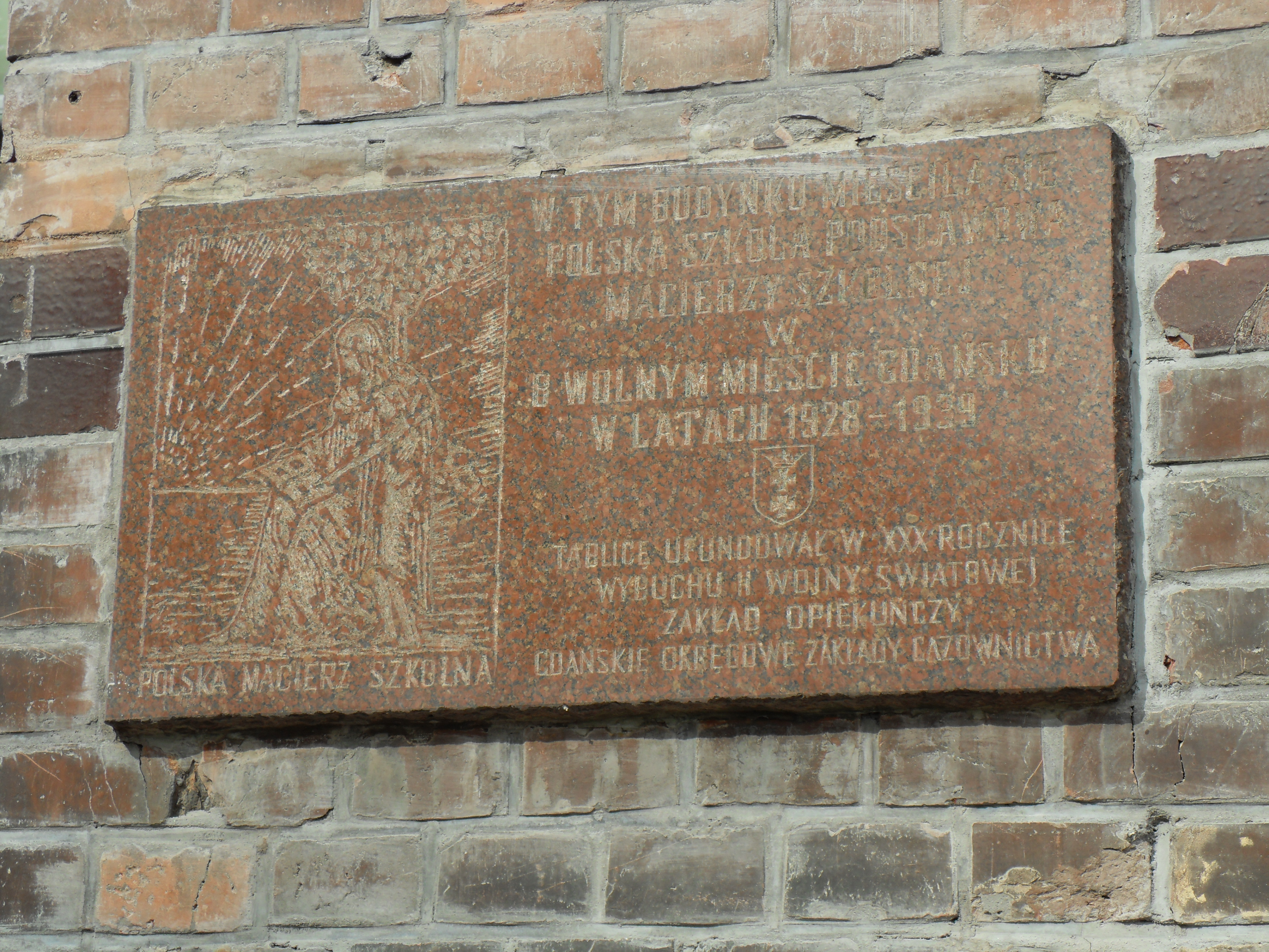 Gdańsk, ul. Wałowa 21.